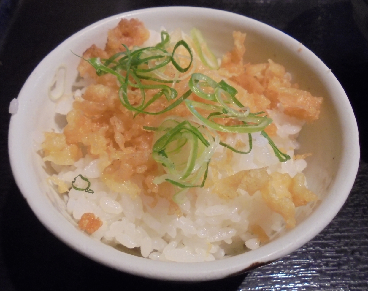 たぬき丼 (Tanuki-don,Donburi).